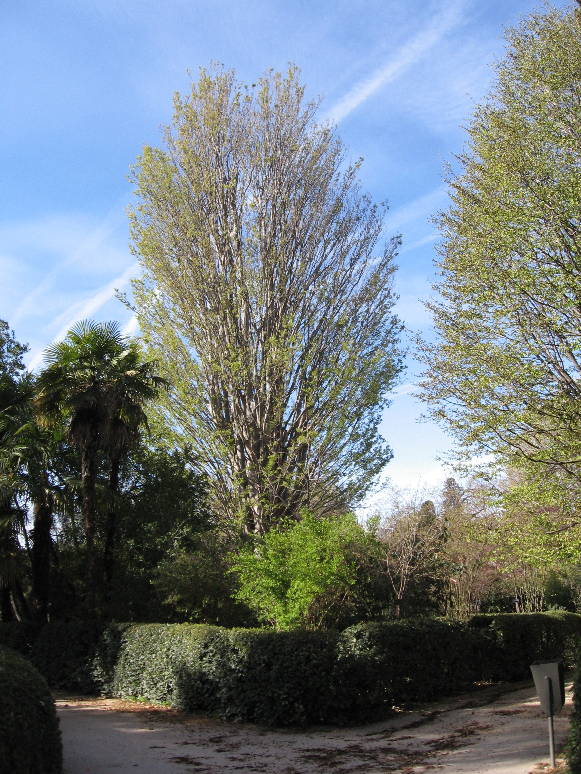 Zelkova carpinifolia en primavera. Real Jardín Botánico, Madrid, España.